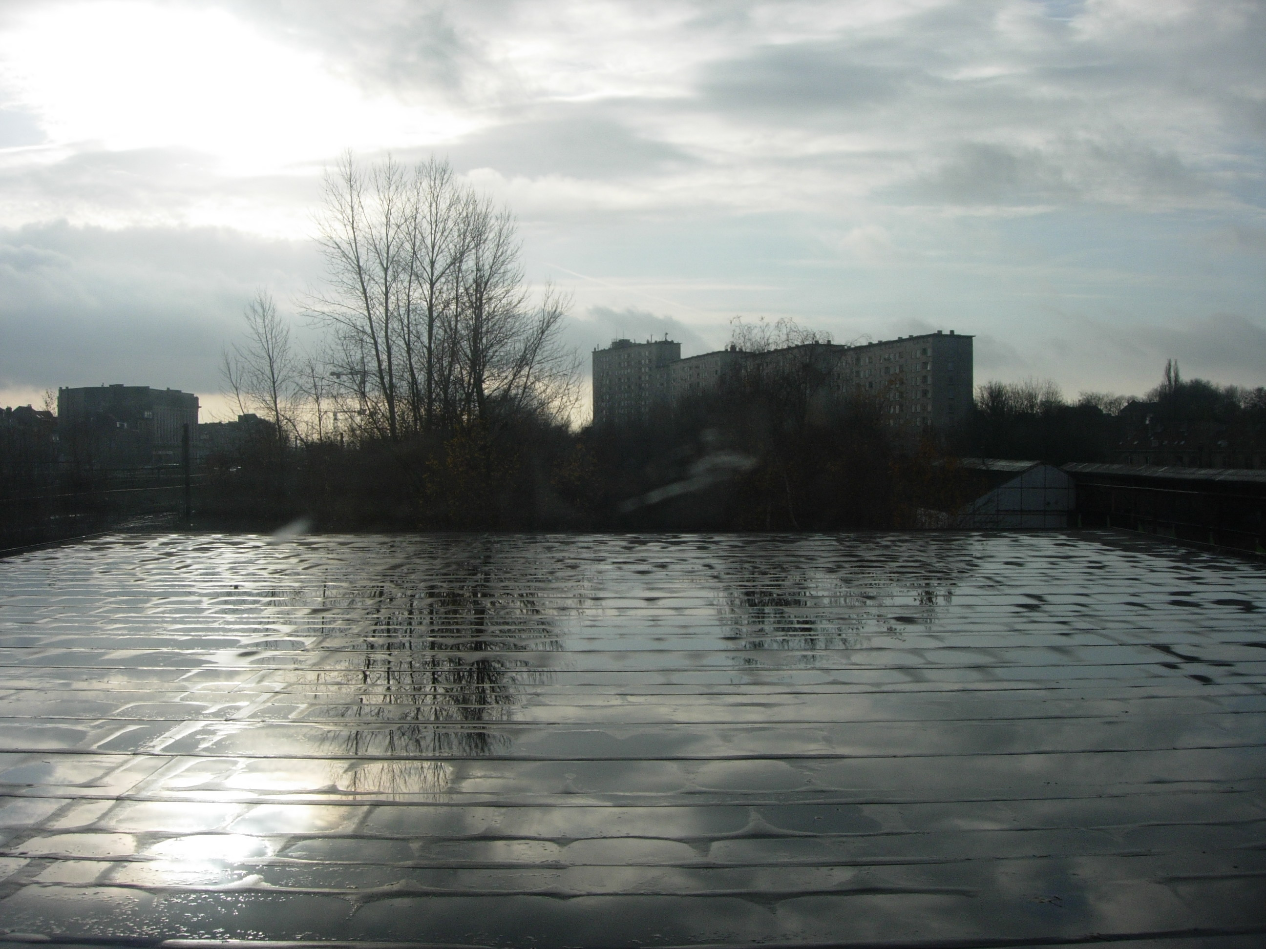 vue depuis le toit de la station de métro Beekkant (Bruxelles) Auteur : Philippe Caufriez